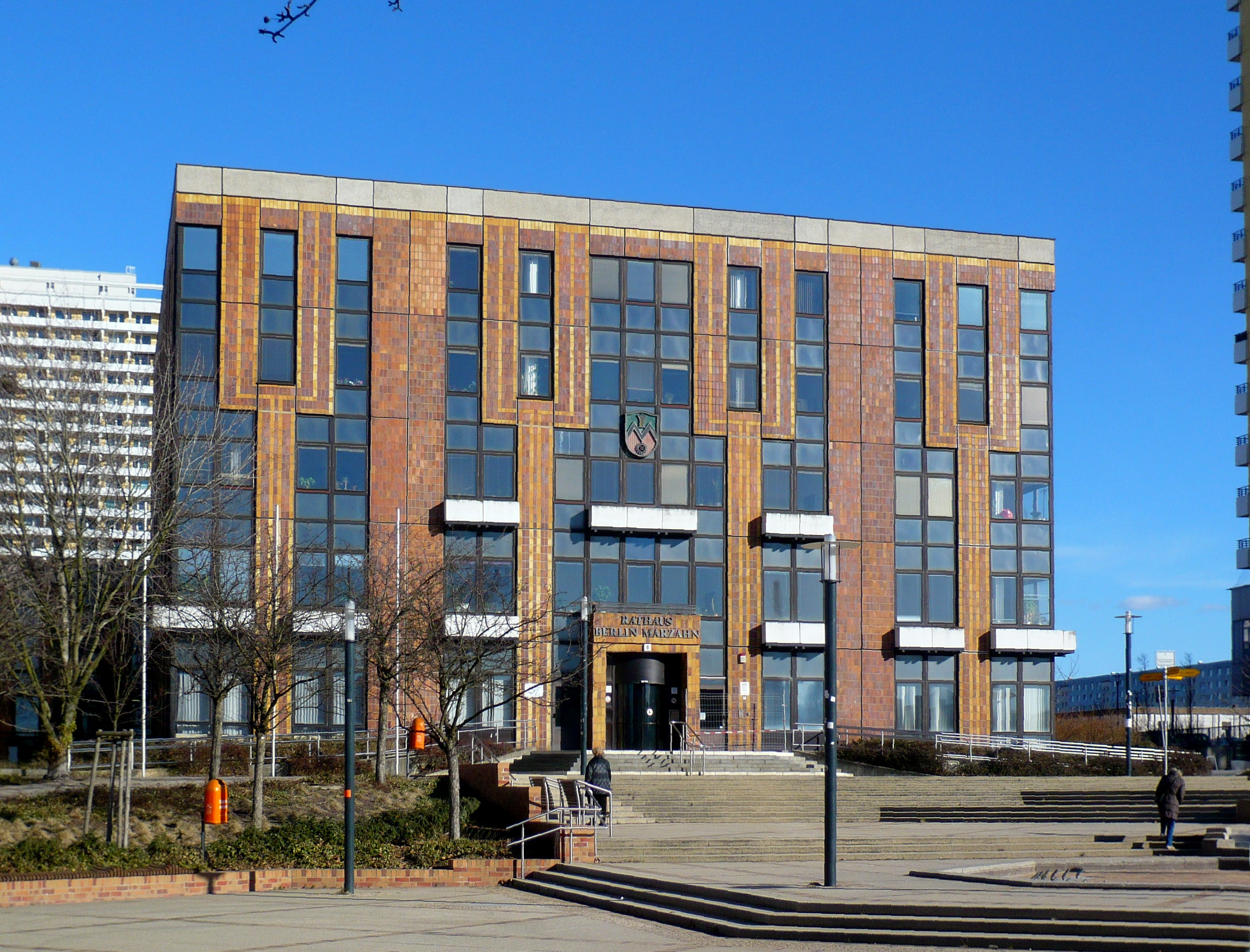 Ortsteil Berlin-Marzahn: Helene-Weigel-Platz, eh. Rathaus